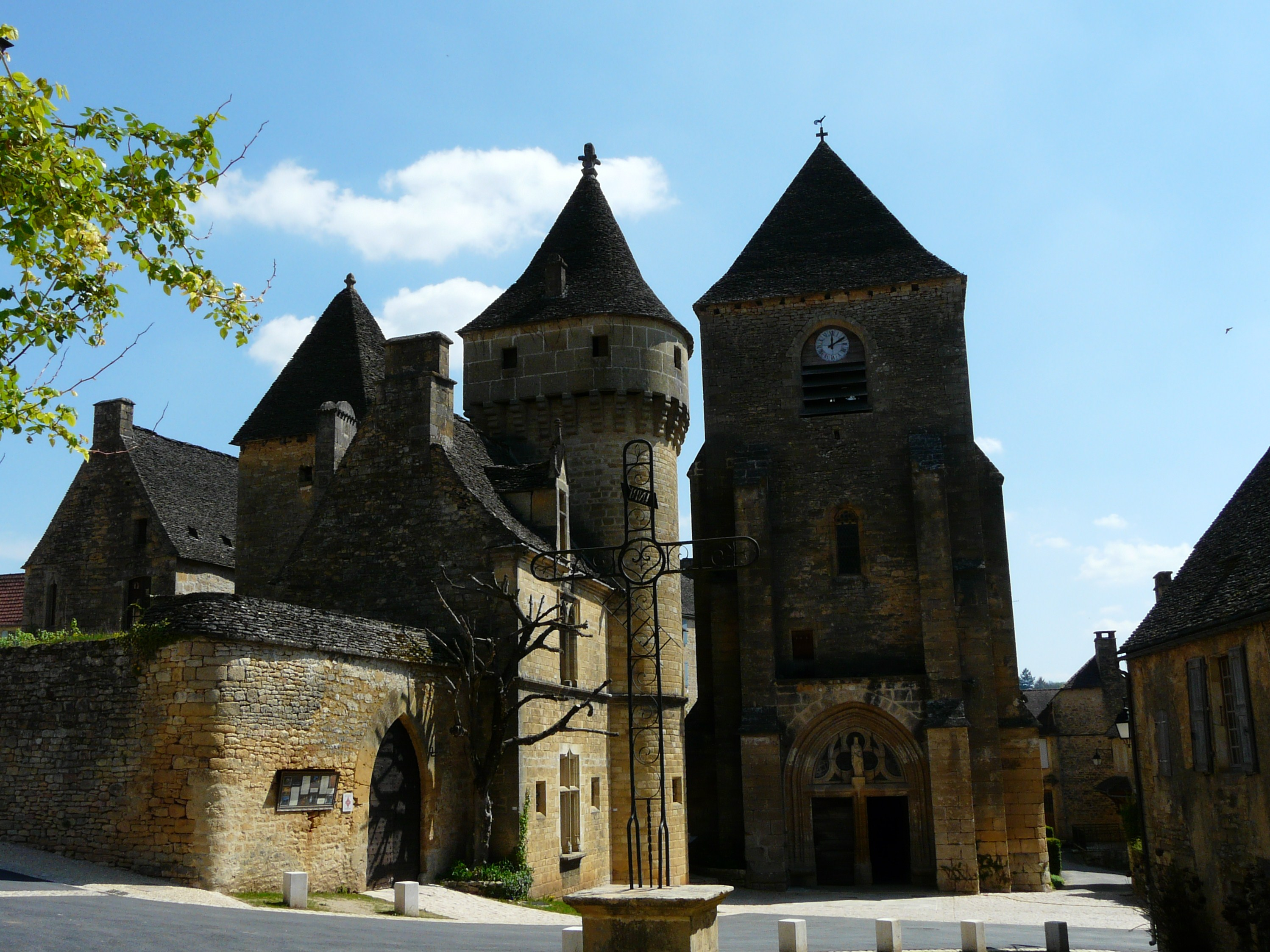 Séparés par un étroit passage, le château de Saint-Geniès et l'église Notre-Dame de l'Assomption, Saint-Geniès, Dordogne, France. Vue prise du côté ouest.